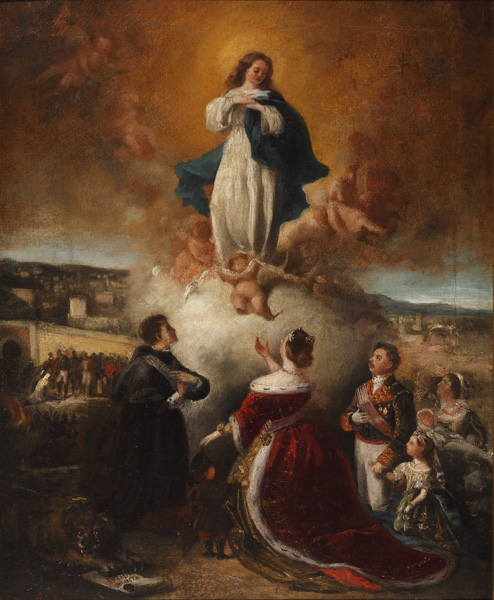 Pintura al óleo. Isabel II y su familia con el Patriarca de las Indias dando gracias a la Virgen.